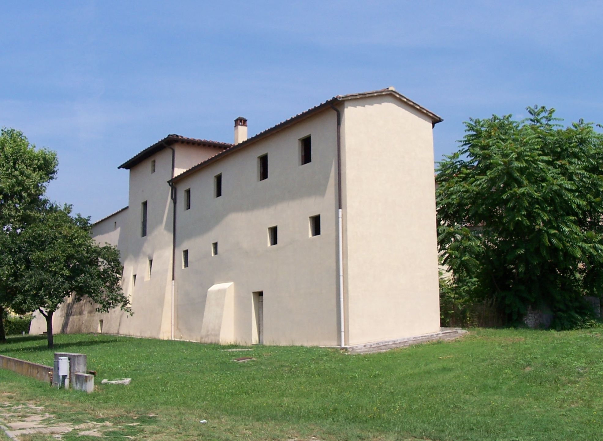 Badia, Monastero dell'Abbazia di San Salvatore in Agna, Montale PT